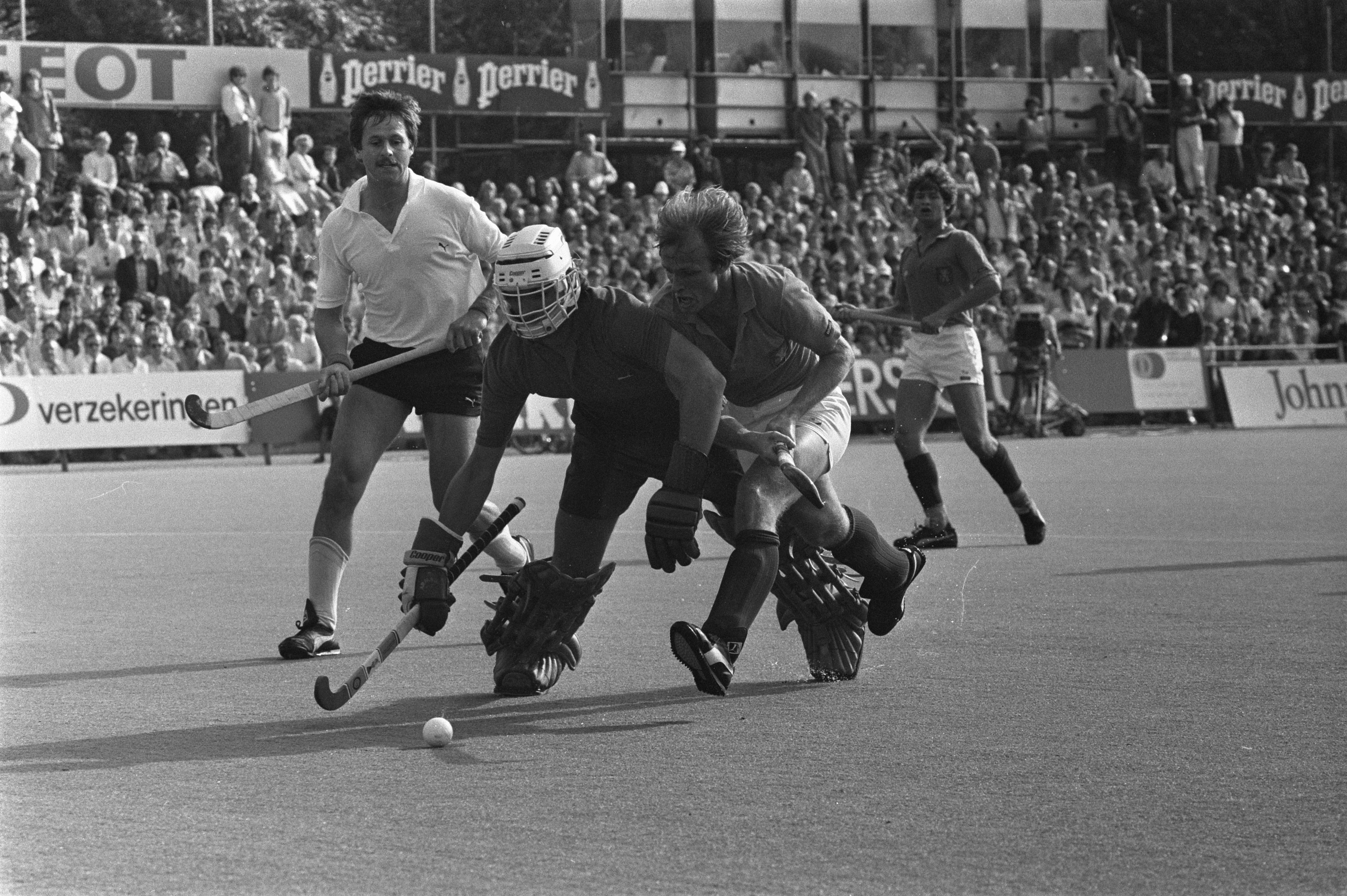 Collectie / Archief : Fotocollectie Anefo Reportage / Serie : [ onbekend ] Beschrijving : Hockey, Nederland tegen West-Duitsland; Diepeveen (Ned.) in duel met doelman Frank (West-Duitsland) Datum : 9 juni 1982 Trefwoorden : hockey Persoonsnaam : FRANK Fotograaf : Dijk, Hans van / Anefo Auteursrechthebbende : Nationaal Archief Materiaalsoort : Negatief (zwart/wit) Nummer archiefinventaris : bekijk toegang 2.24.01.05 Bestanddeelnummer : 932-2046